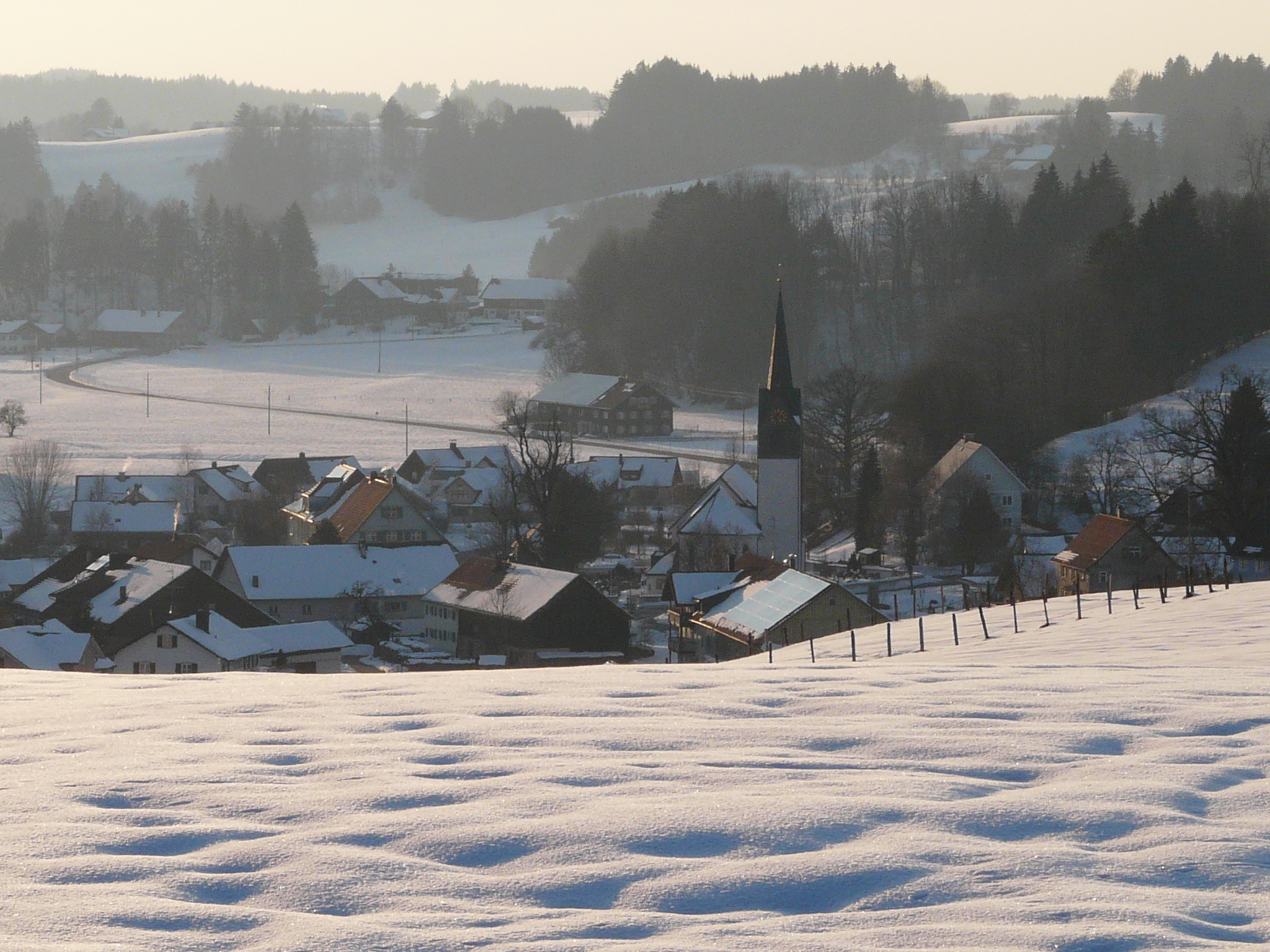 Gestratz von Osten